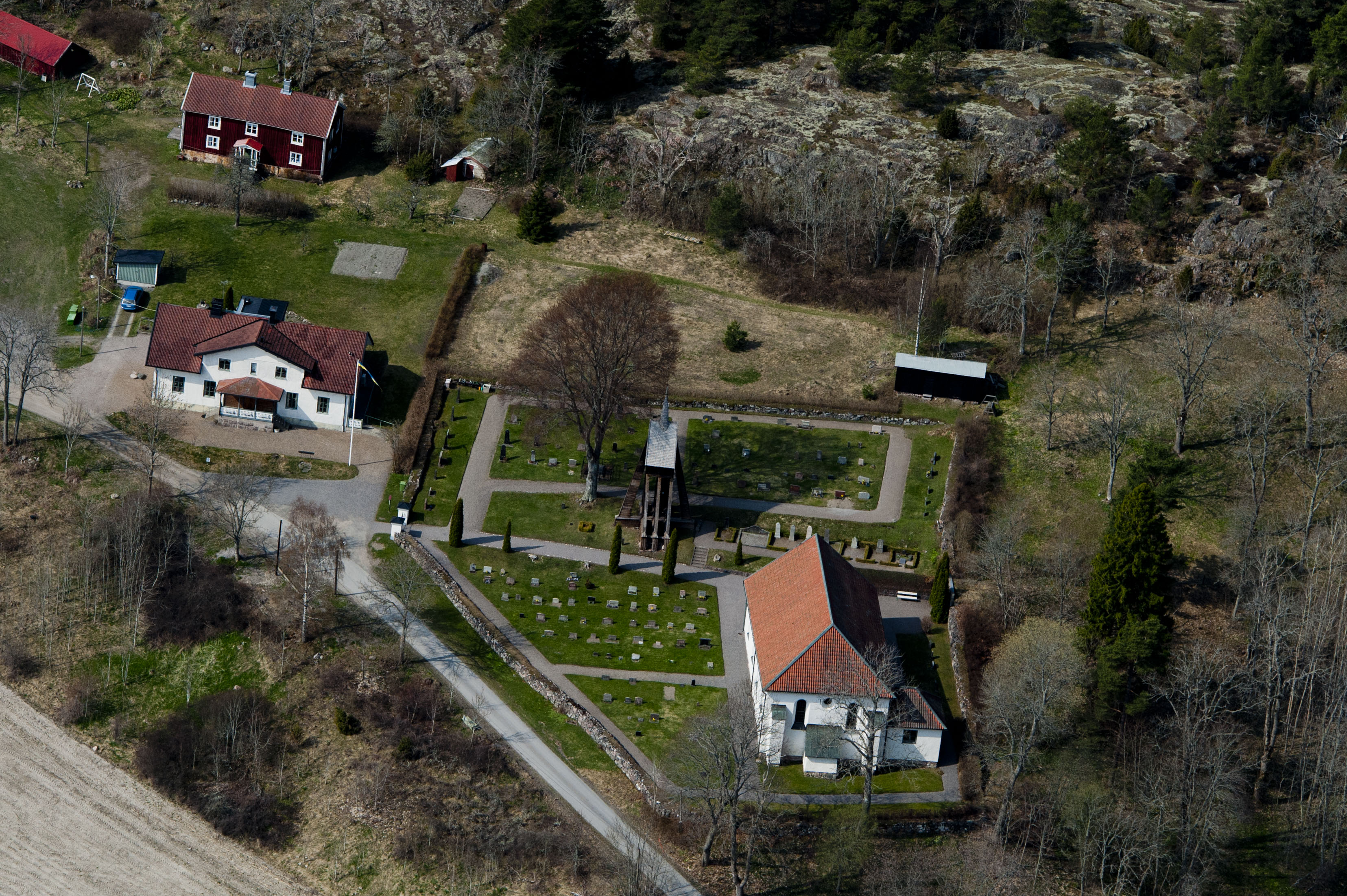 Rönö ka